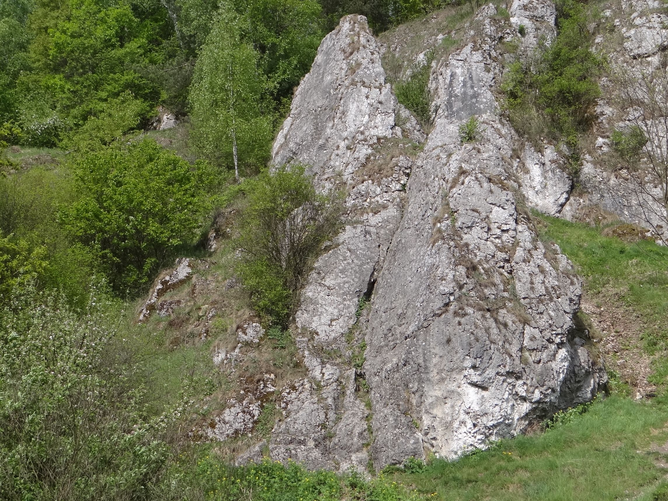 Mała Płyta w Dolinie Kobylańskiej